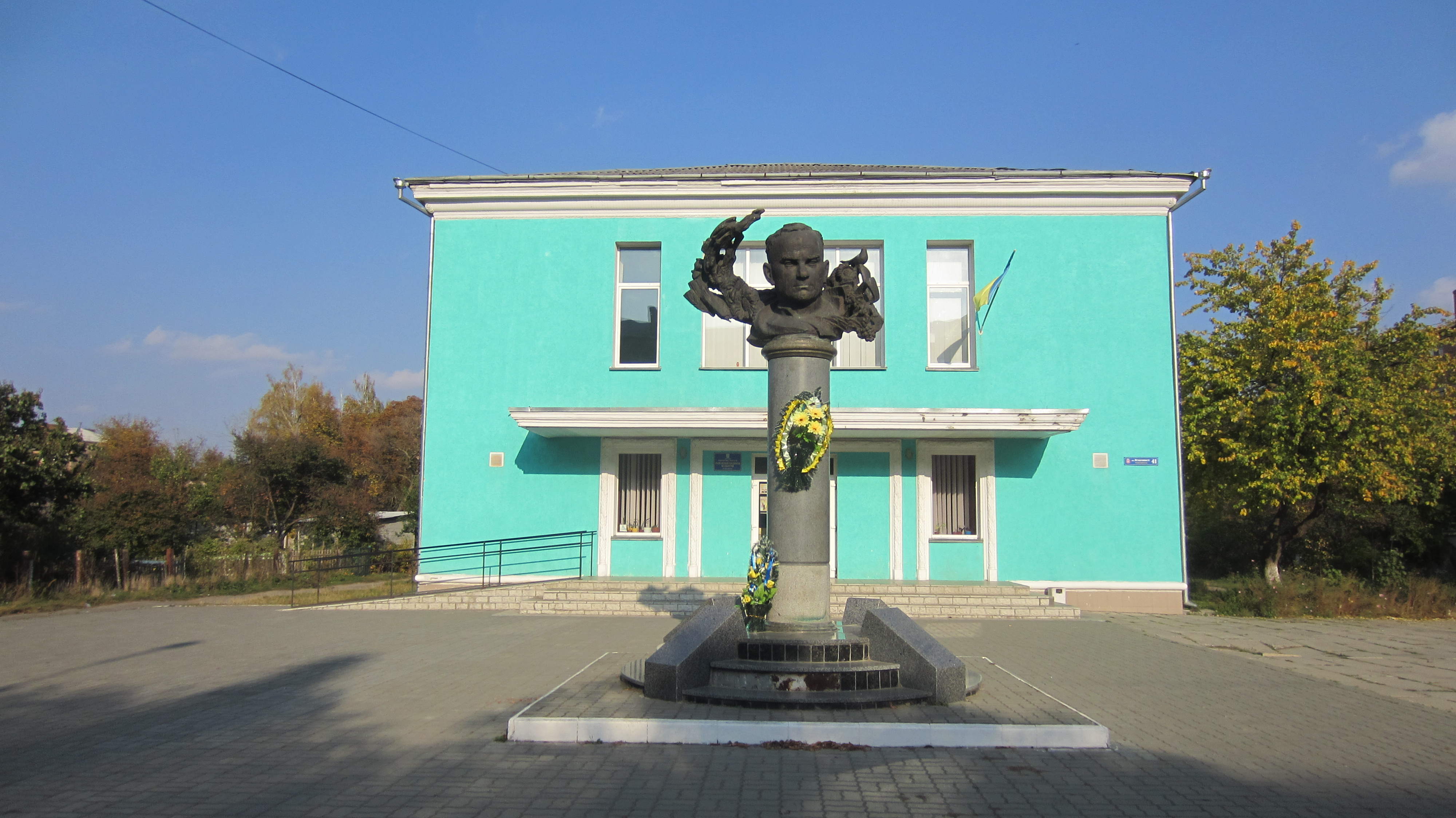 Пам'ятник Уласу Самчуку, Здолбунів